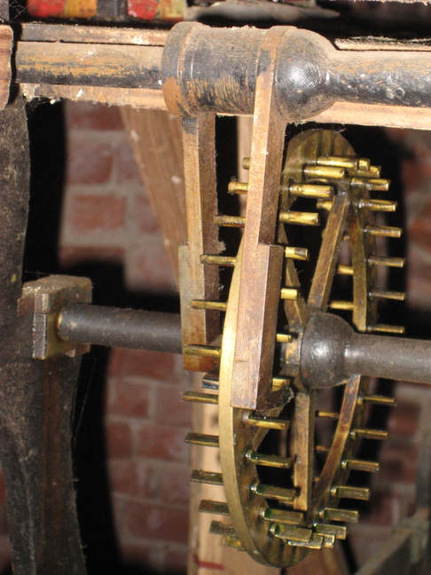 Beispiel einer Scherenhemmung